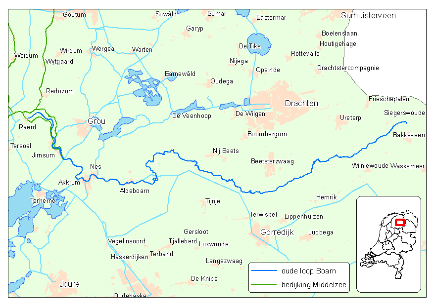 Zelf gemaakt kaartje met de oorspronkelijke loop van het riviertje de Boarn (nl: Boorne)